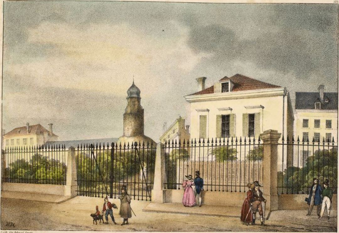 47. Vue de la Tour Hydraulique sur les nouveaux Boulevards.